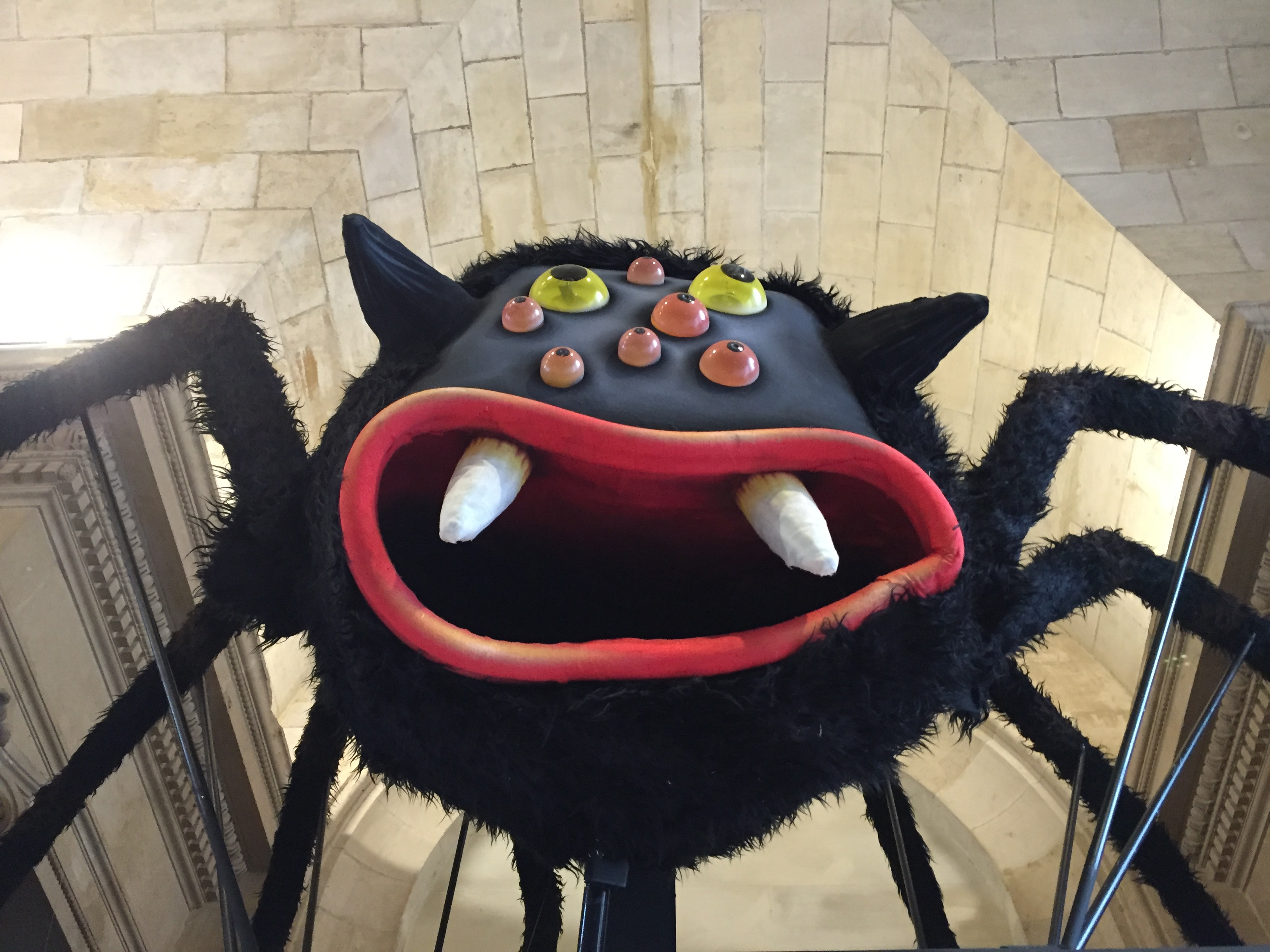 expo club súper 3 palau Robert